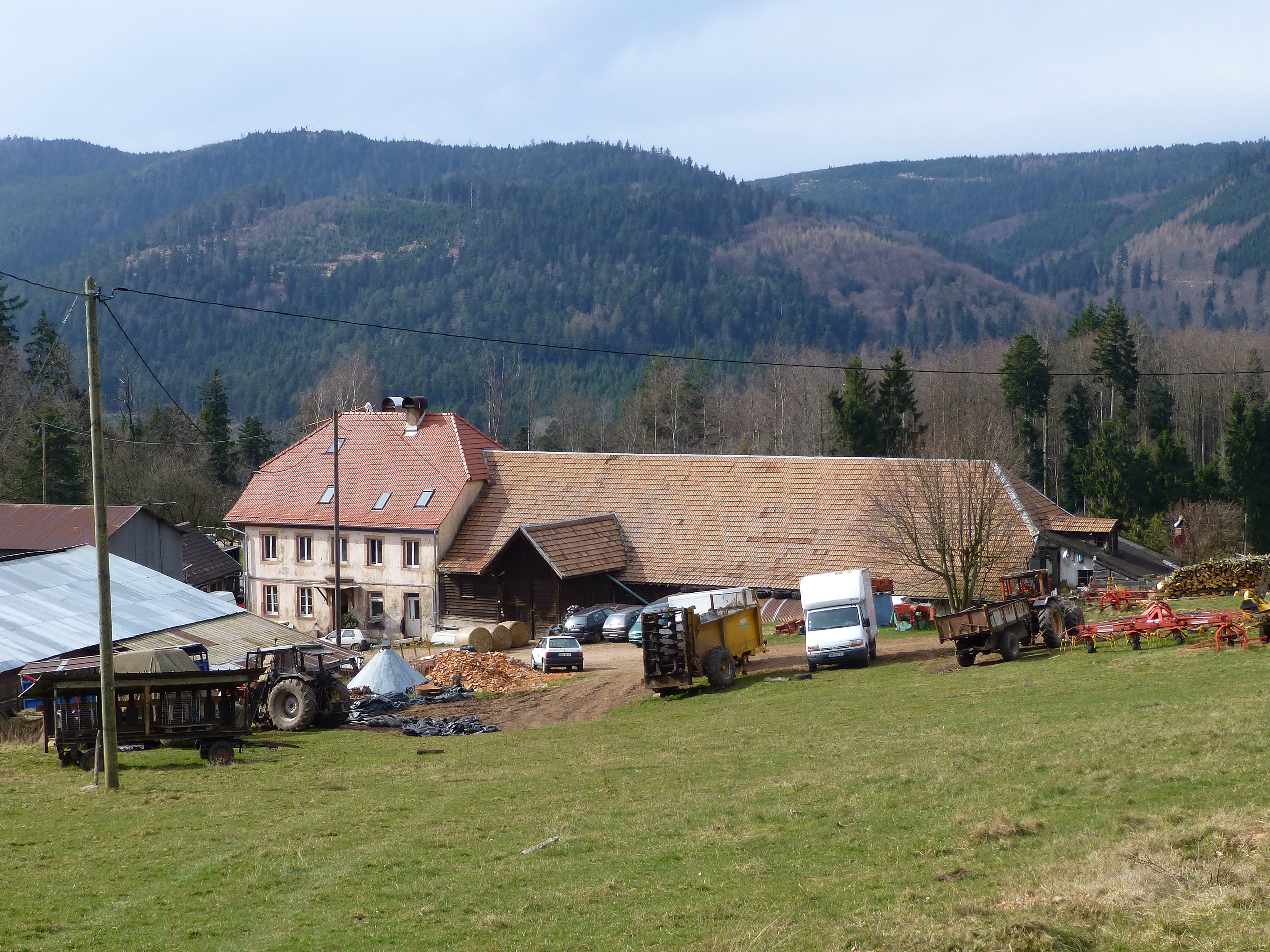 La Broque (Bas-Rhin) : ferme de Malplaquet, où des anabaptistes sont attestés en 1828